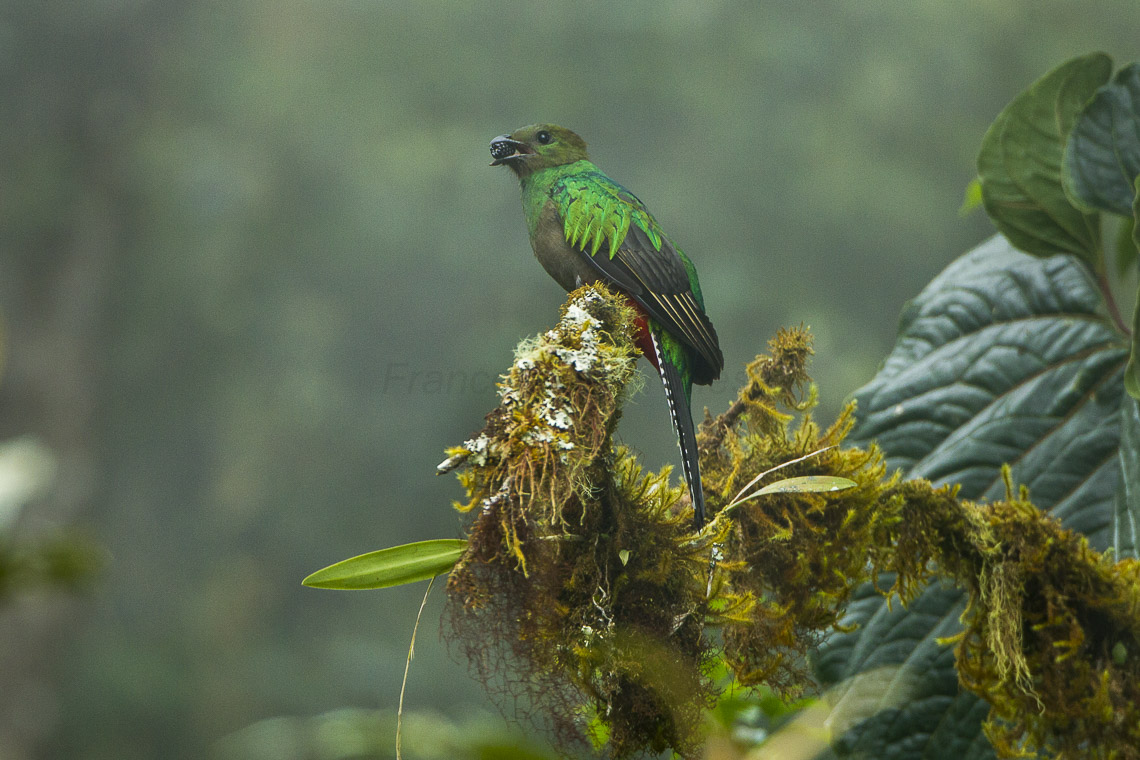 Resplendent Quetzal female - Cloud Forest in Costa Rica_S4E9396